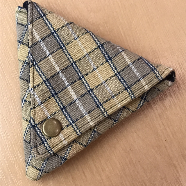 福井県鯖江市で織られている佐々木理恵氏制作の石田縞のコインケース。